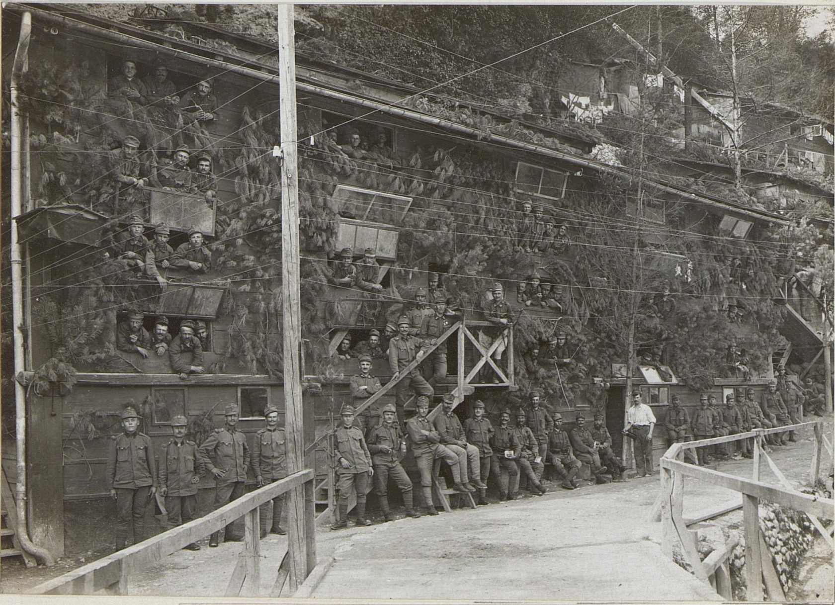 Mannschaftsunterkunft in Tolmein